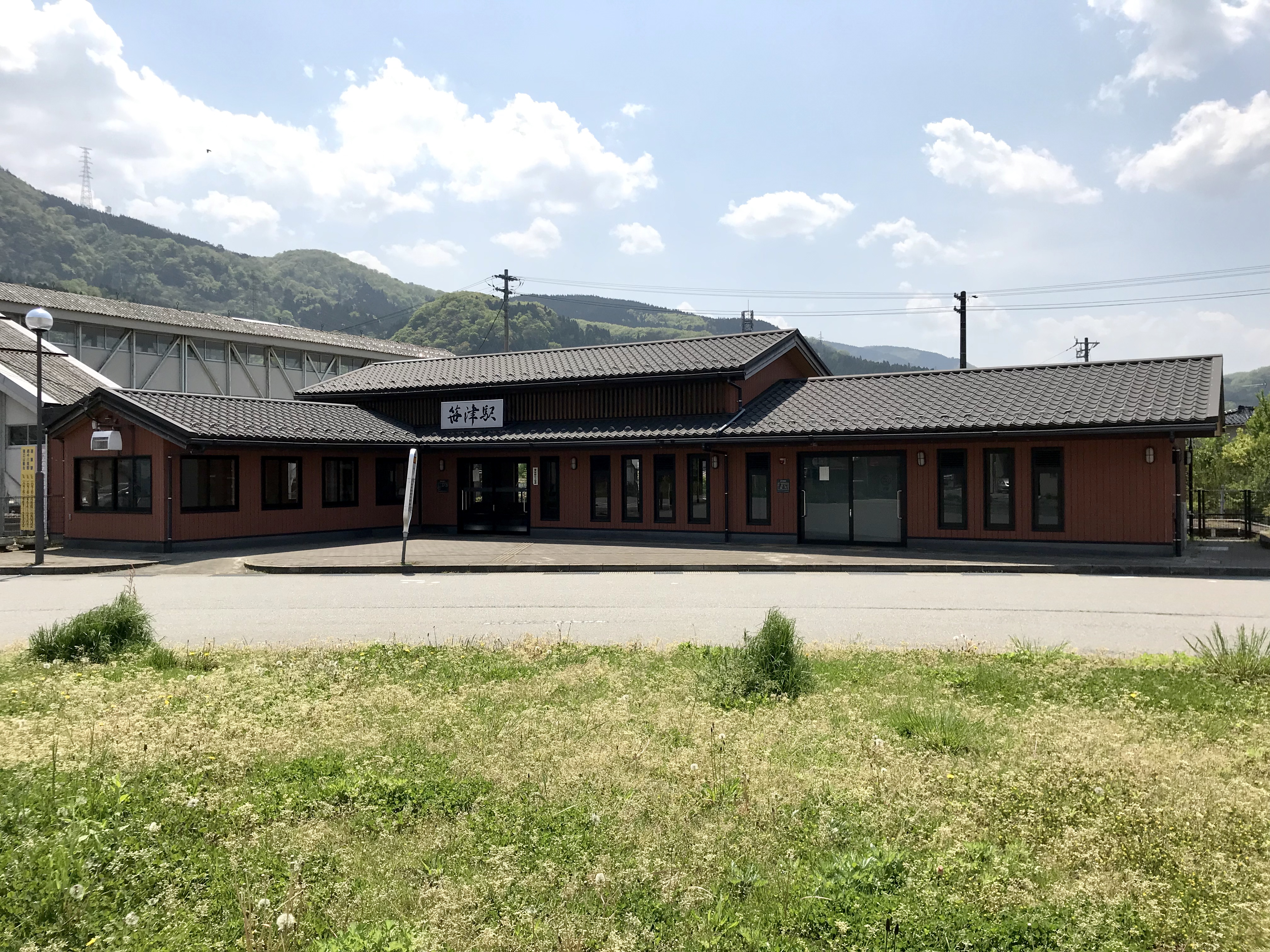 JR西日本高山本線笹津駅駅舎